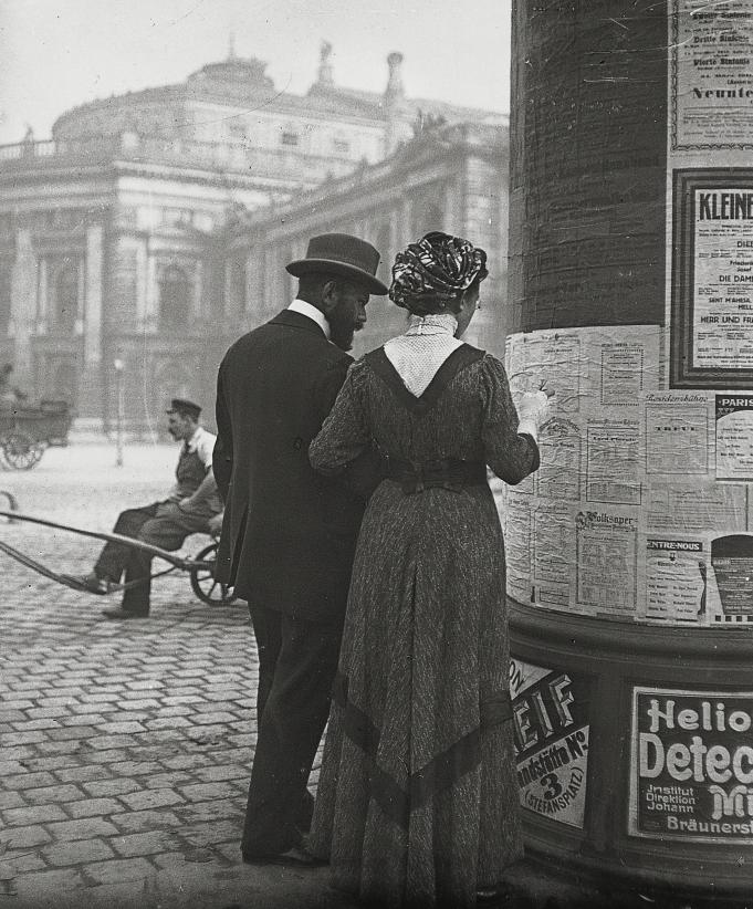 Passanten studieren Theaterprogramme an einer Litfasssäule beim Burgtheater, Wien